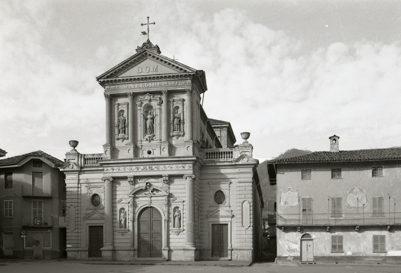 Serie fotografica : Rocca Canavese, 1979 / Paolo Monti. - Strisce: 1, Fotogrammi complessivi: 6 : Negativo b/n, gelatina bromuro d'argento/ pellicola ; 35 mm. - ((Sul portanegativi:Sul portanegativi: N[I]K[O]N-E FP4 e iscrizione tipografica commerciale: "KINO - CINE - FOTO - OTTICA/ Corso Sempione 3/ 20145 Milano/ Telefoni/ 347769 - 381662 [cancellato a pennarello nero]; stampa tipografica a inchiostro rosso "K". - All'interno dle portanegativi: la serie è anche identificata da due linee orizzontali a pennarello nero che separano, delimitandola, la suddetta serie rispettivamente dalla precedente e dalla successiva di soggetti diversi. - Fonte: Agenda di Paolo Monti: Nikon Leika 3001-/ Monti 1978 (1978-1982), presso Archivio Paolo Monti